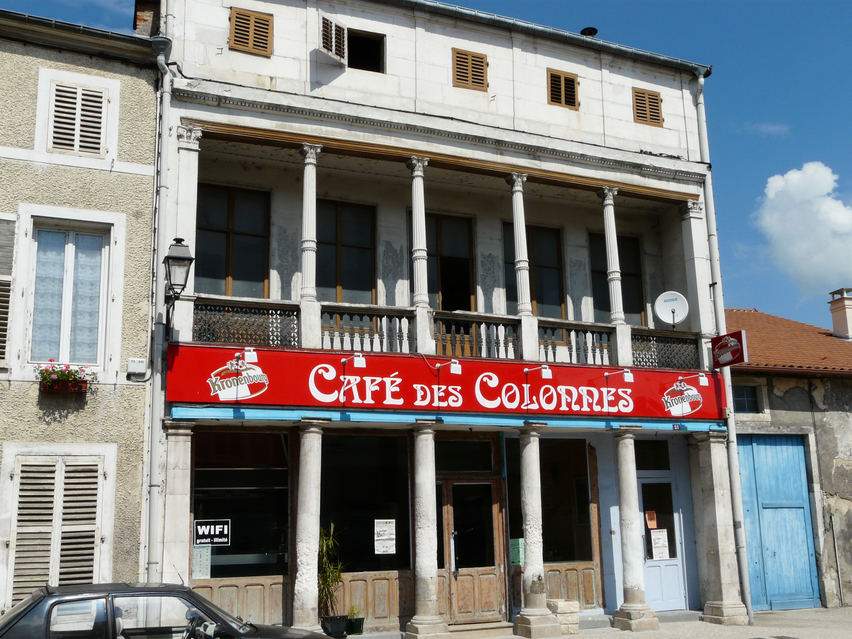 Le café des Colonnes à Void-Vacon (Meuse, France)